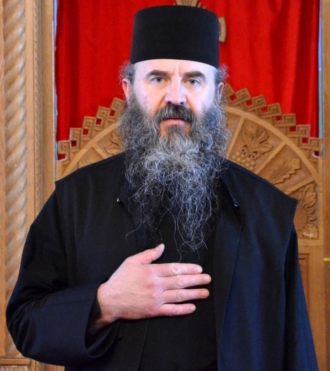 Parintele Hariton Negrea